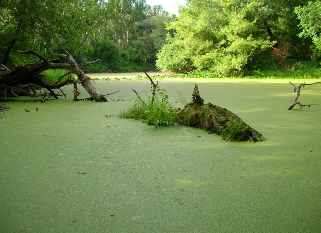 Wielka Kępa Ostromecka k. Bydgoszczy